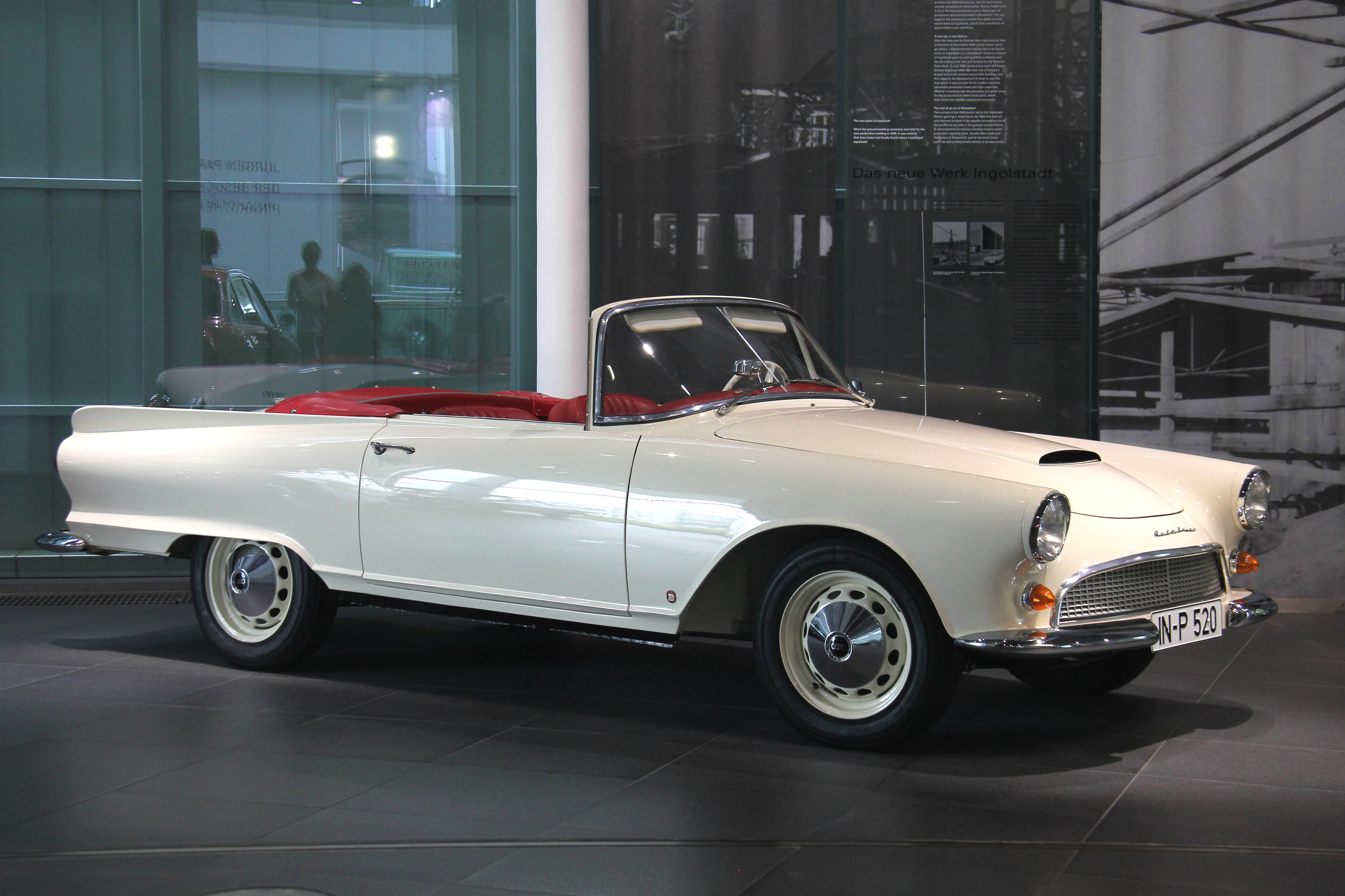 Auto Union 1000 Sp Roadster im museum mobile in Ingolstadt. 3-Zylinder-Zweitaktmotor, 980 cm³, 55 PS. Bauzeit 1958 bis 1965